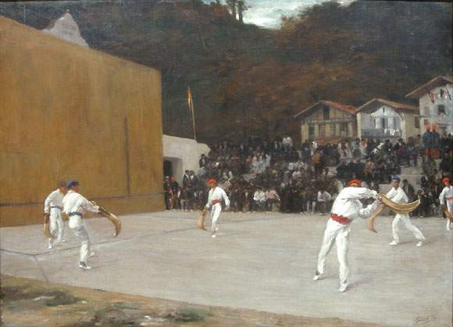 Henri Achille Zo: La pelote Basque à Pasajes de San Juan, oil on canvas, 37,4 x 51,2 in. / 95 x 130 cm